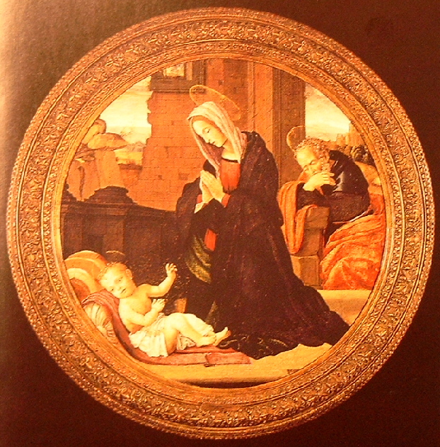 "Madonna in aanbidding voor Christus" Filippino Lippi, 1495-1500, tempera op rond paneel, doormeter 86 cm Bonnefantenmuseum te Maastricht Deze afbeelding is een zelf genomen foto van een gekochte afbeelding van het werk in de museumshop van het Bonnefantenmuseum te Maastricht